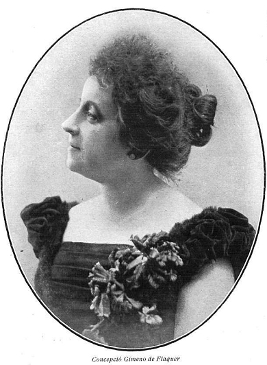 Retrato de Concepción Gimeno de Flaquer, en el suplemento Feminal, de la revista La Ilustració Catalana.